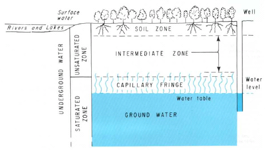 น้ำใต้ดินแบ่งออกเป็น 3 โซนได้แก่ soil zone, intermediate zone และ the upper part of capillary fringe